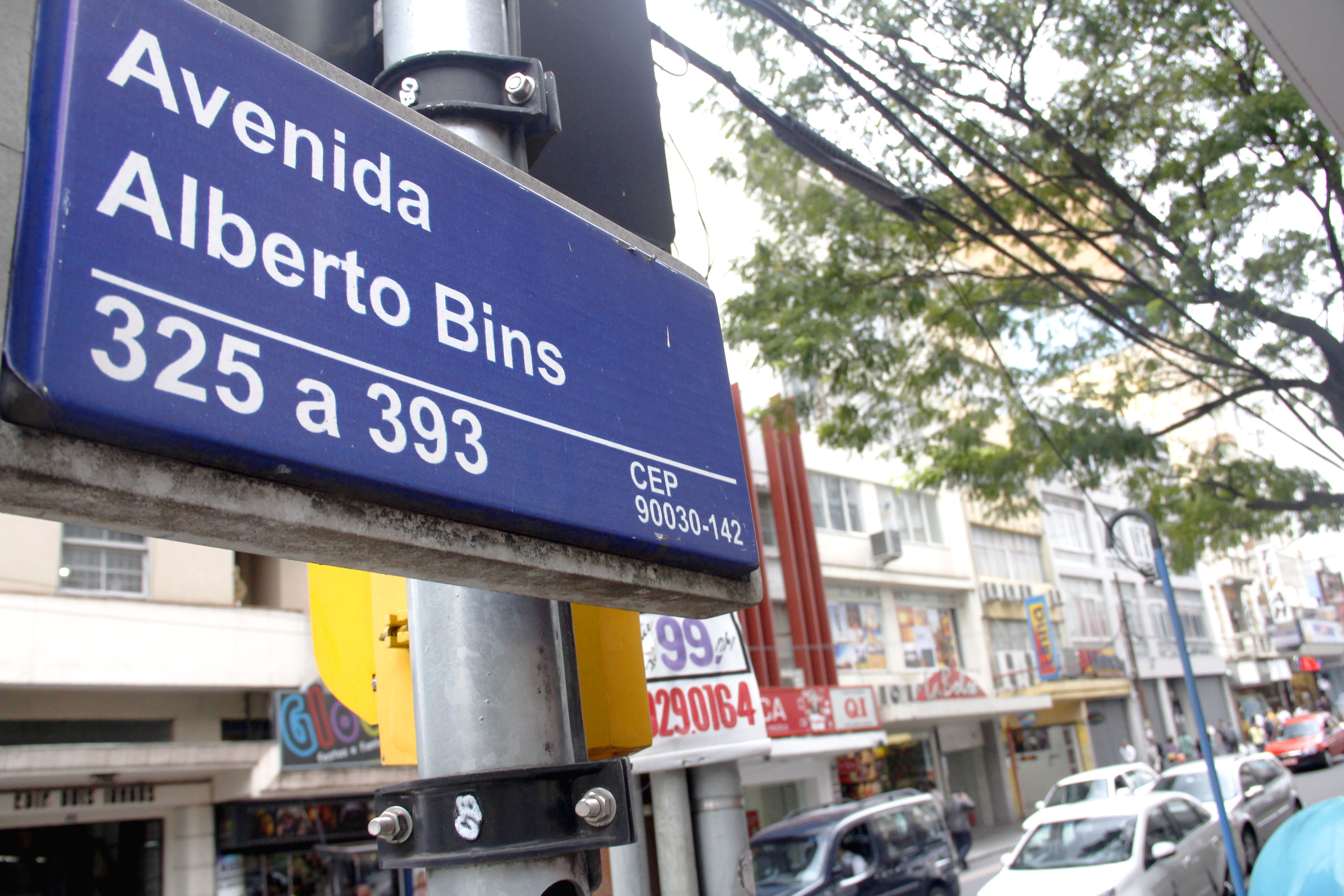 Avenida Alberto Bins - Localiza-se na área central da cidade. A urbanização da mesma foi feita por ele. Há um busto em sua homenagem no Parque Farroupilha. O político encontra-se enterrado no Cemitério São Miguel./ Foto: Guilherme Testa